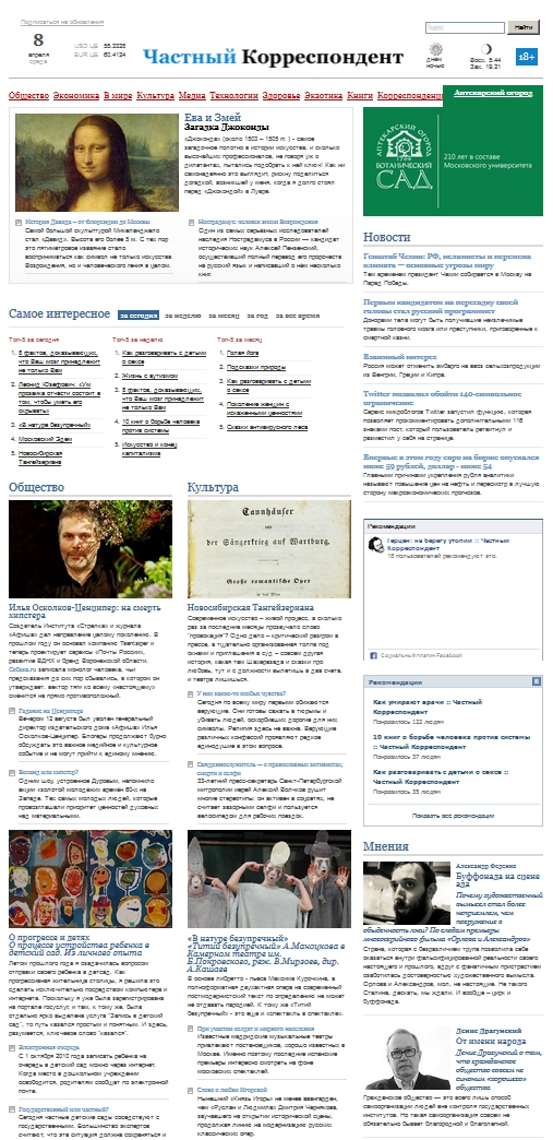 Скриншот издания "Частный Корреспондент"